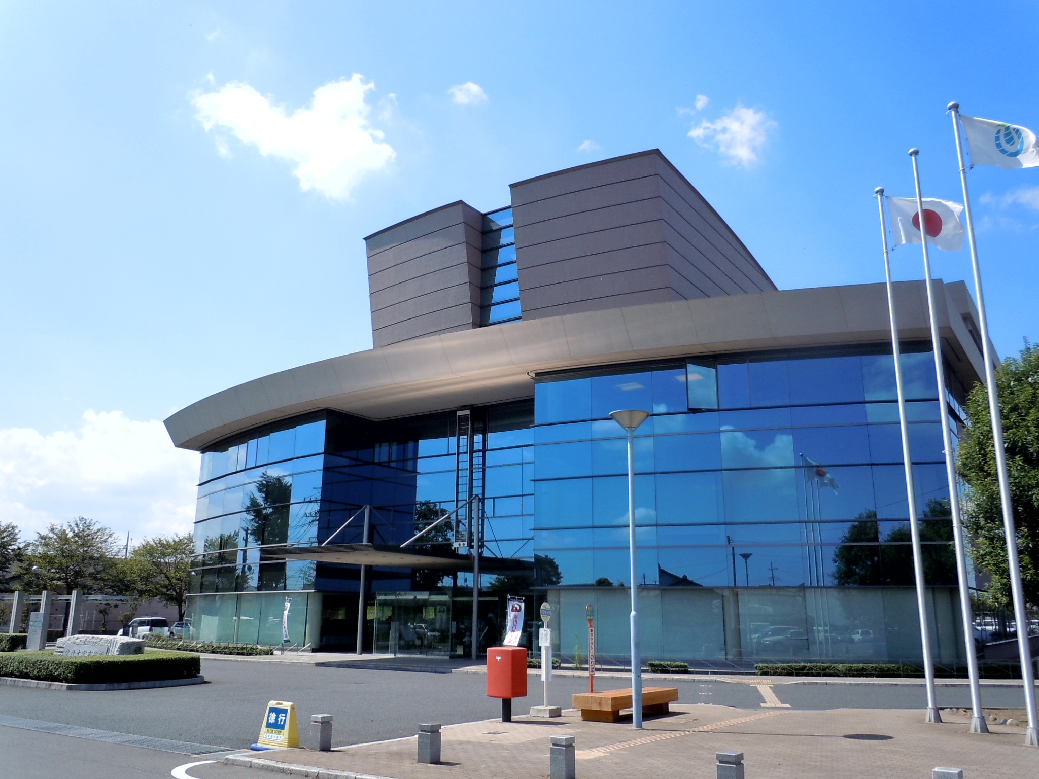 常陸大宮市役所